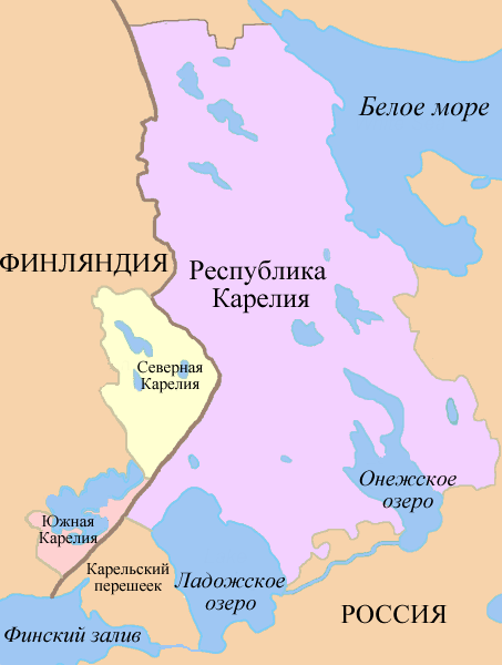 Карелия